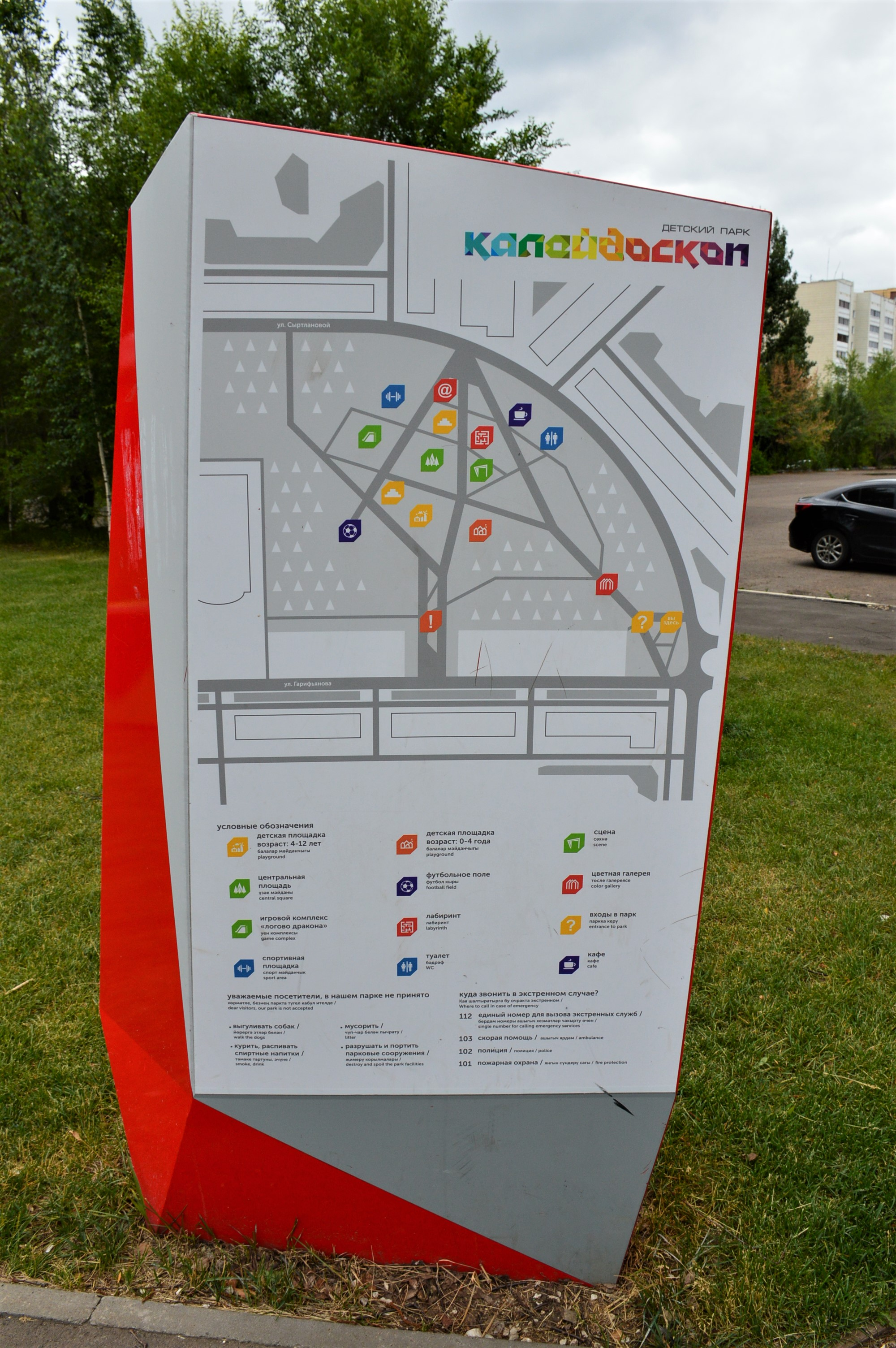 Казань. Детский парк «Калейдоскоп»: информационный стенд